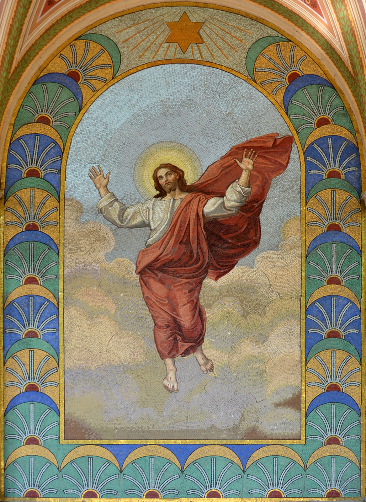 Viktor Foerster, Zmrtvýchvstalý Kristus (podle Raffaela Santi), kolem 1908, Vyšehradský hřbitov, hrobka rodiny Eiseltů